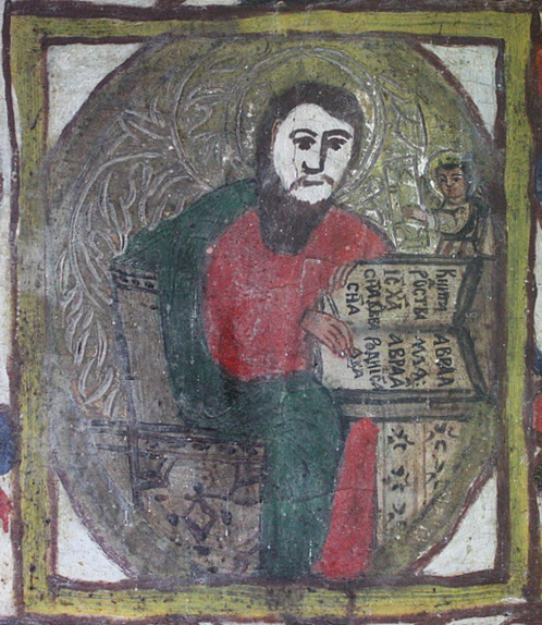 Biserica de lemn din Măleni, județul Sălaj.